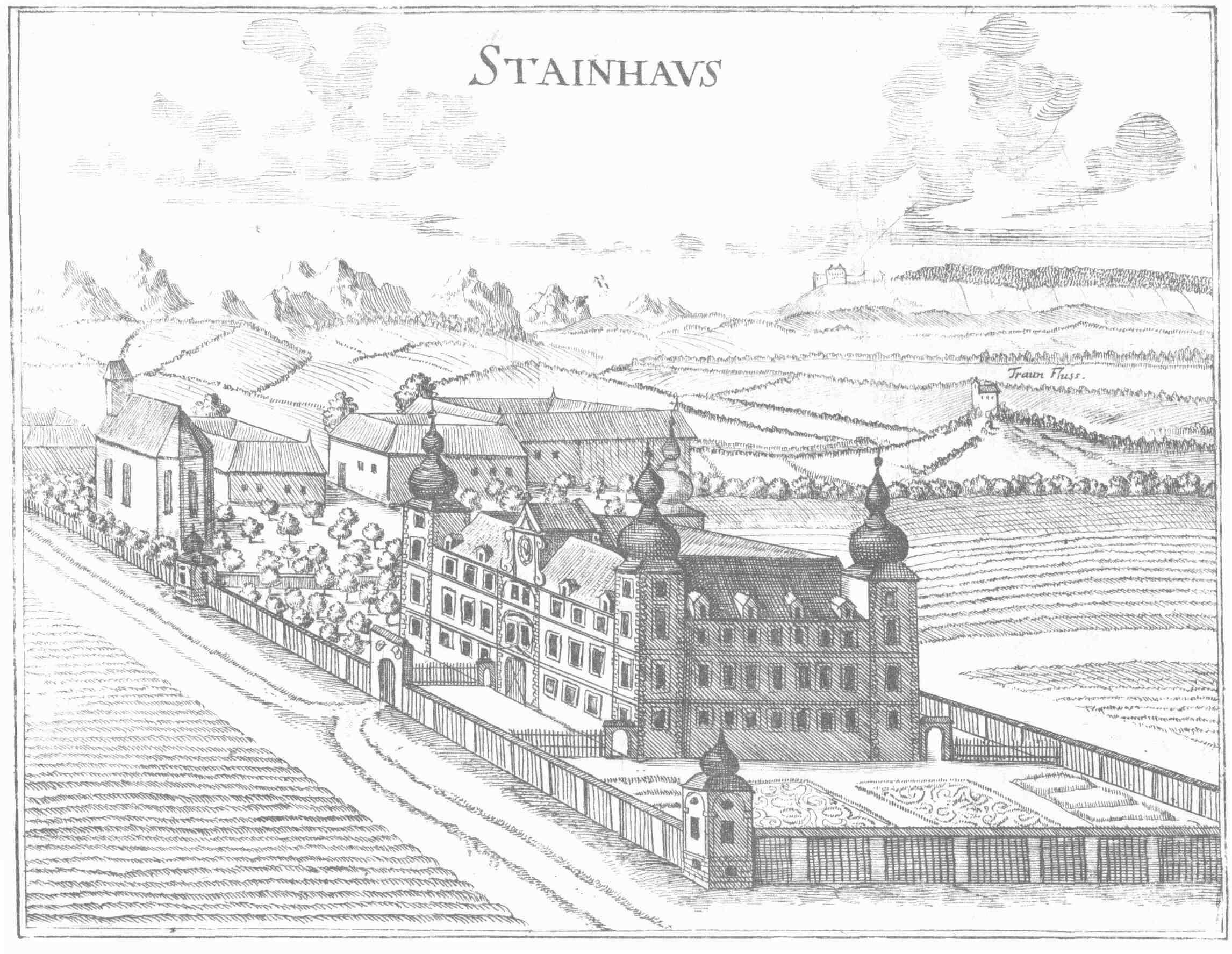 Kupferstich, Ansicht von Schloss Steinhaus nach Vischer